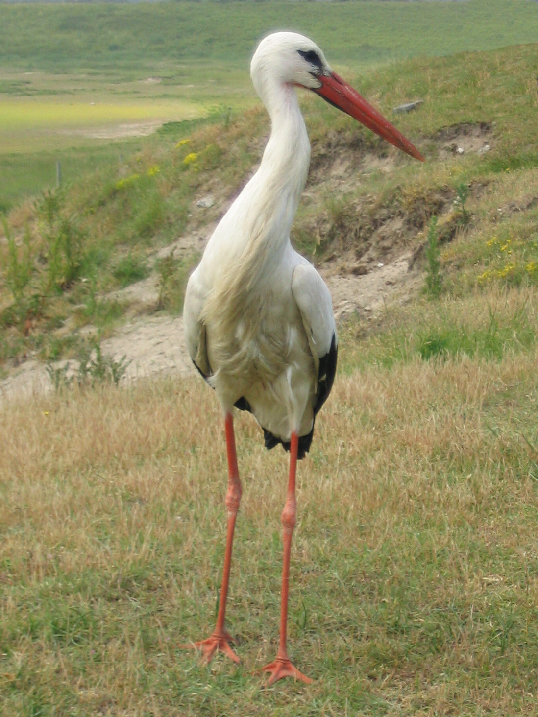 Een sperwer (wijfje) eet een duifje op de garageoprit te De Klinge, België Ooievaar met publiek in het Zwin